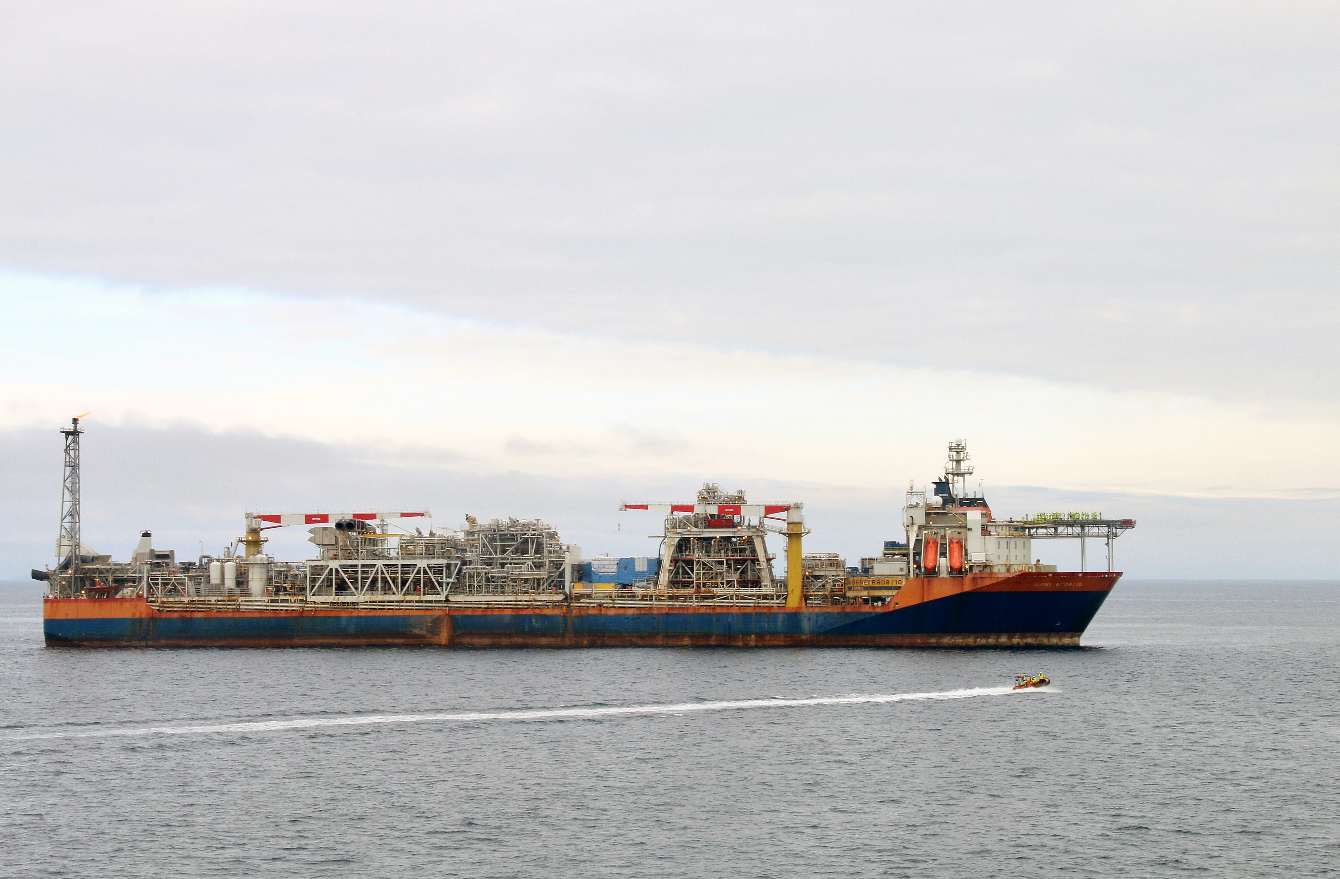 Vanndypet på Nornefeltet er 380 meter og feltet er bygd ut med et produksjons- og lagerskip tilknyttet brønnrammer på havbunnen. Foto: Øyvind Knoph Askeland, Norsk olje og gass